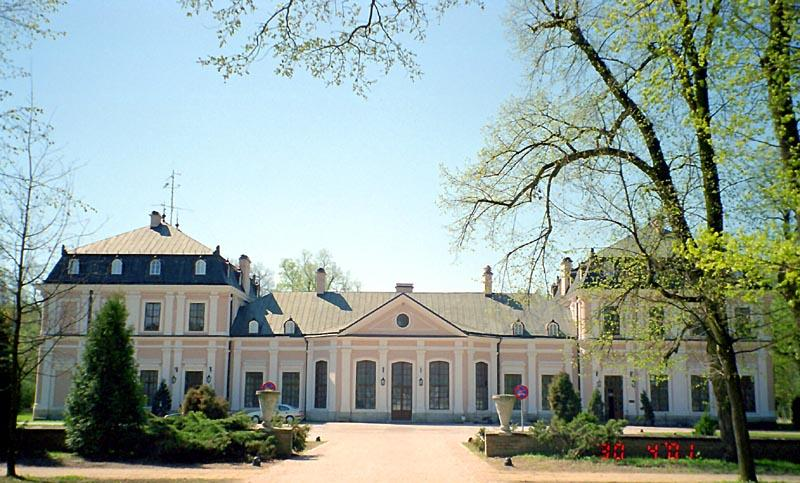 Sieniawa Palace in Poland